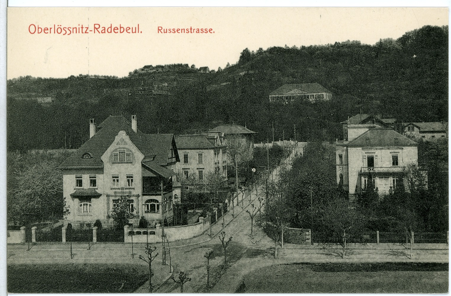 Radebeul; Russenstraße - Oberlößnitz This postcard is from publisher Brück & Sohn in Meißen ( postcard has a unique number 10870 and is available in a higher resolution at the publisher. This images was uploaded in a cooperation project between Wikipedians and the publisher.